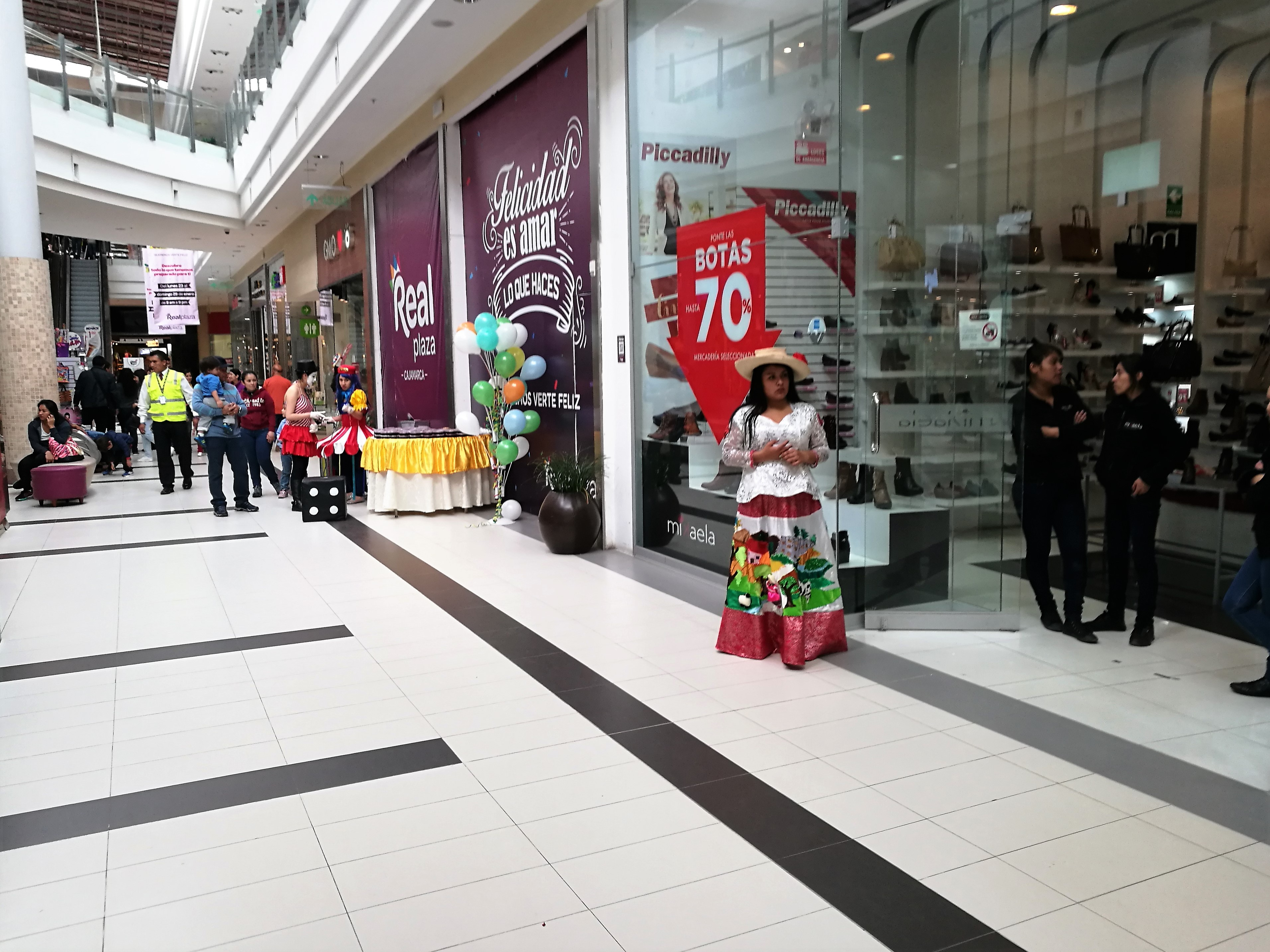 Persones disfraçades a Plaza Vea durant el carnaval de Cajamarca 2017